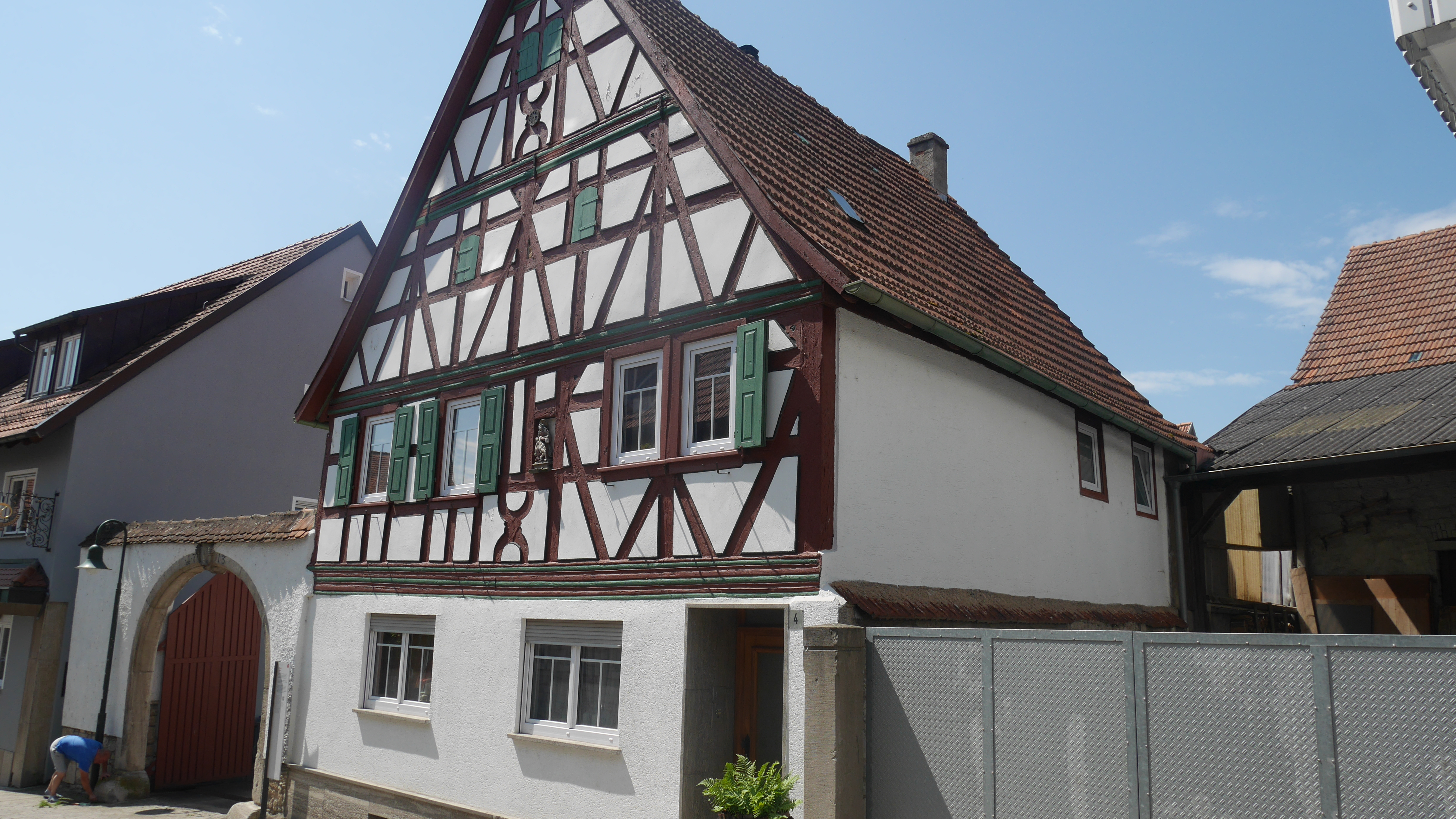 Cultural heritage monuments in Grünsfeld Haus Derr. Beeindruckendes Beispiel eines fränkischen Fachwerkbaus. Die gesamte Hofanlage wurde im Jahr 1692 erbaut. Mit ihrem historischen Brunnen im Garten zeigt sie den ursprünglichen, typisch fränkischen Dreiseithof mit abschließender Toranlage mit Rundbogen (Jahreszahl 1713).